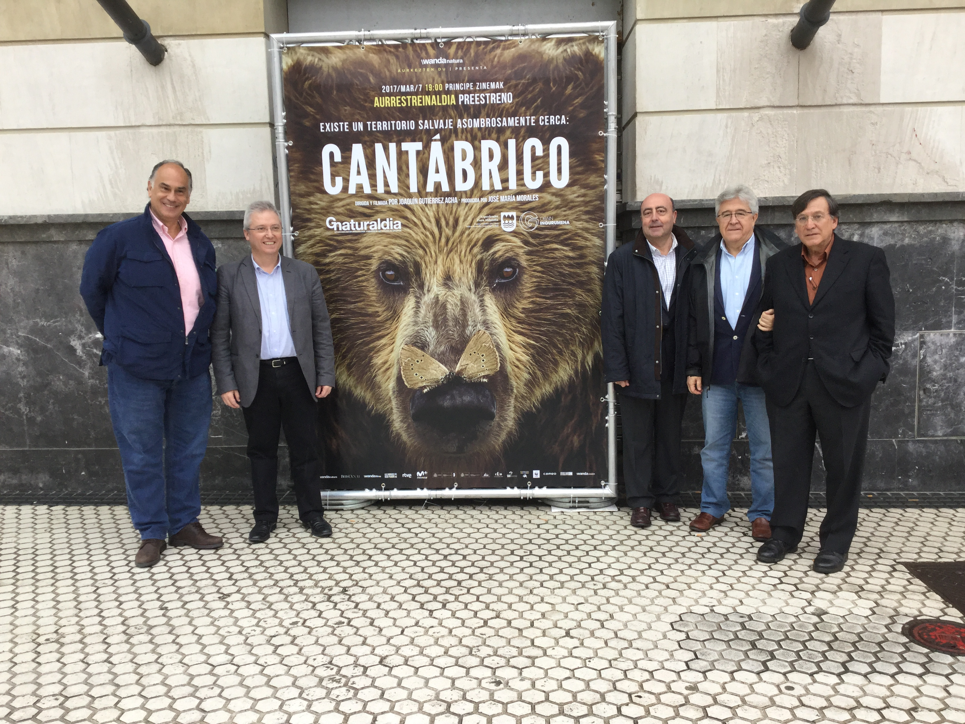 Presentación de la película 'Cantábrico' en los cines Príncipe de Donostia-San Sebastián (7 de marzo de 2017)